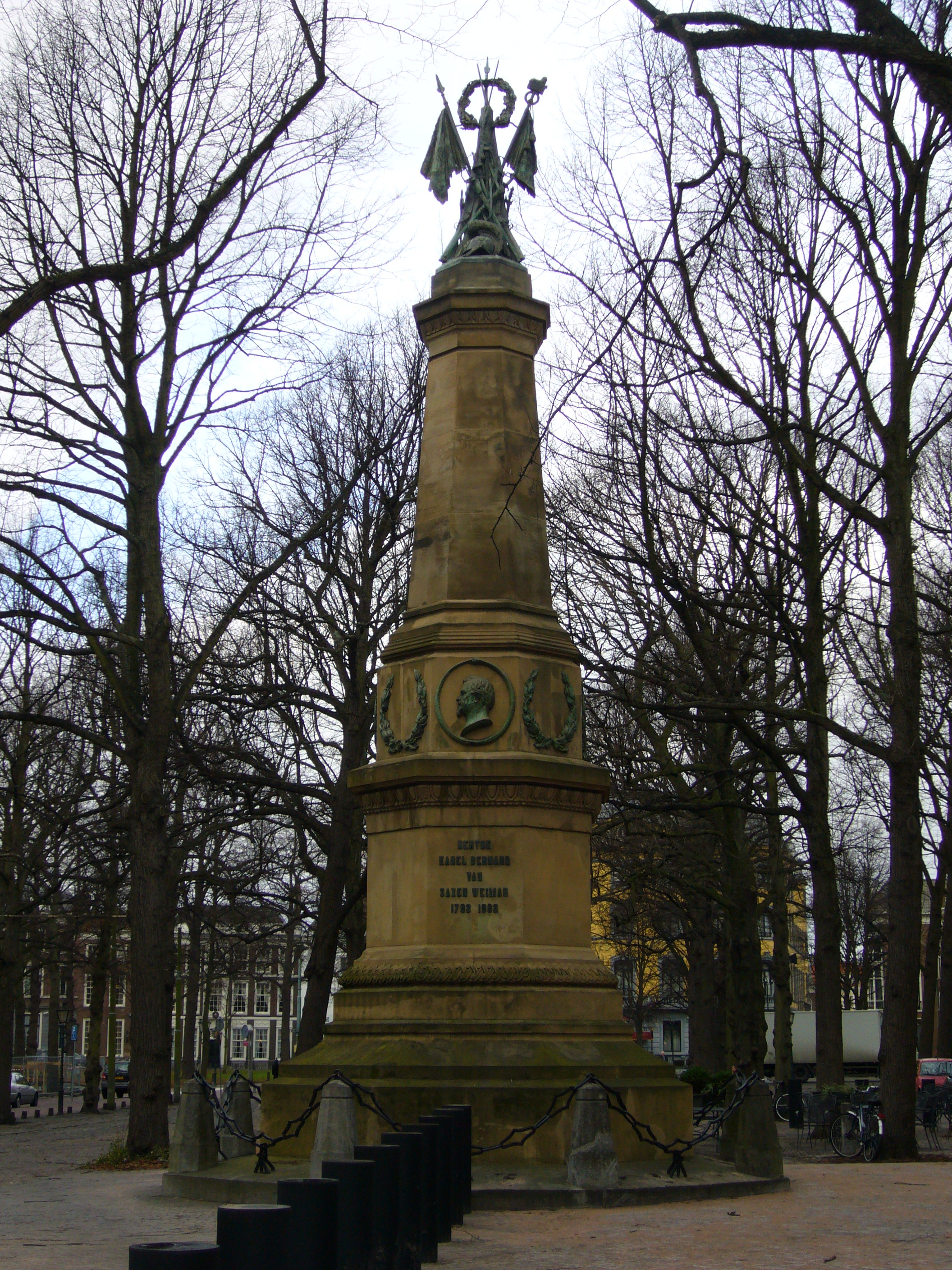 Monument voor Saxen Coburg op het Lange Voorhout in Den Haag